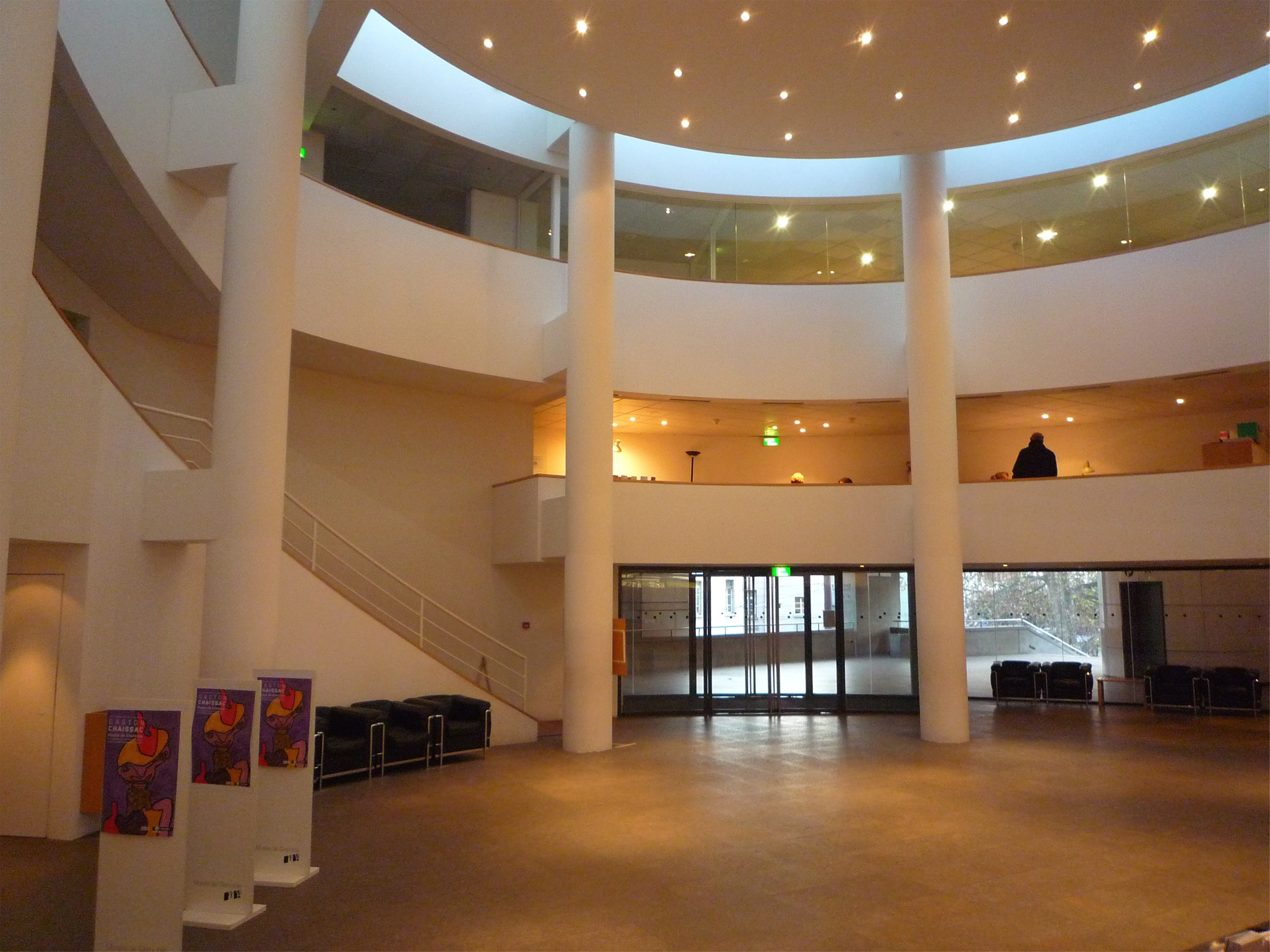 Hall d'accueil du musée de Grenoble